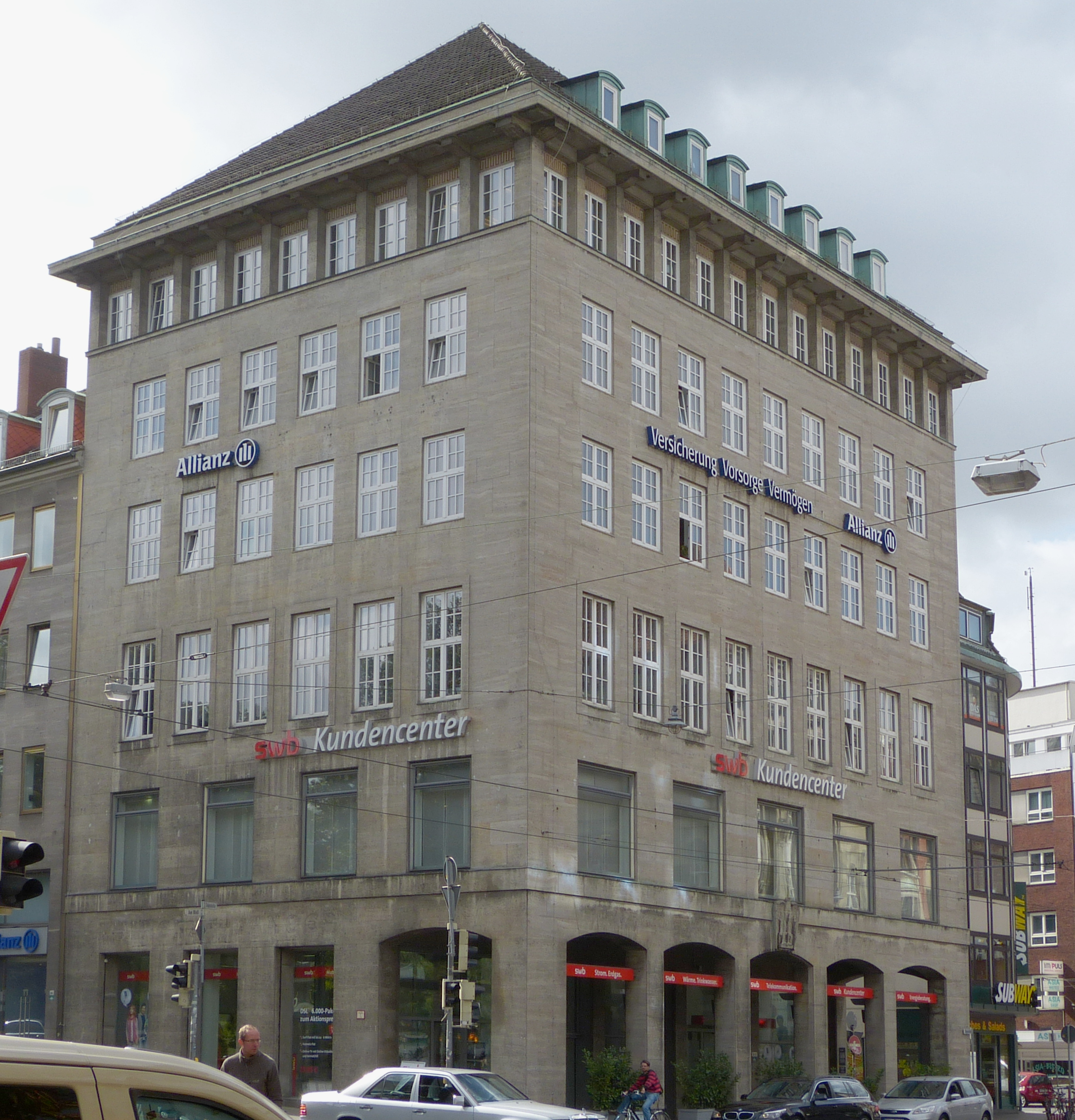 Allianz-Haus in Bremen, Sögestraße 59Das abgebildete Objekt ist ein geschütztes Kulturdenkmal in der Freien Hansestadt Bremen, mit der Nr. 1149 beim Landesamt für Denkmalpflege registriert.